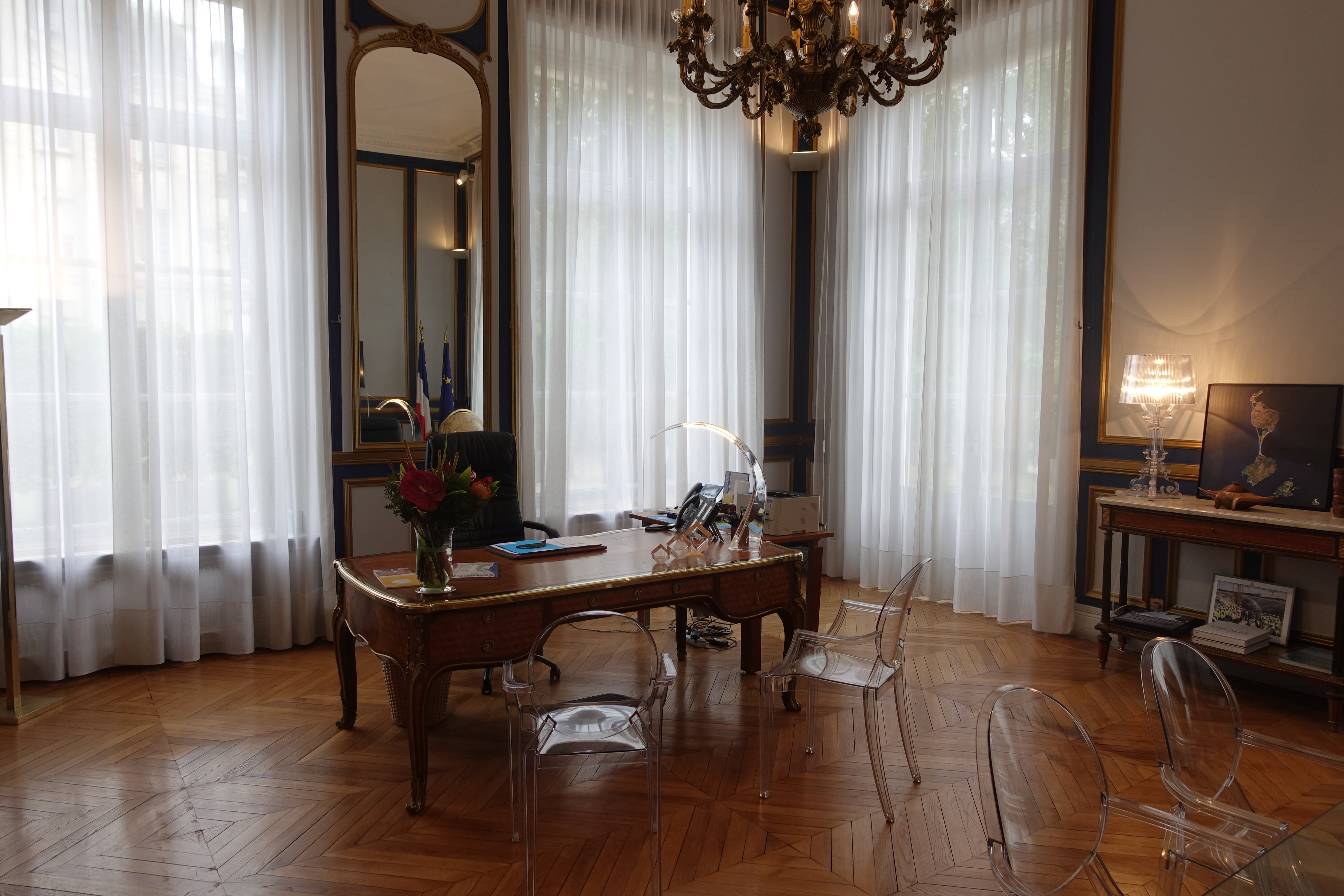 Vue du bureau situé à au ministère des Outre-Mer, à Hôtel de Montmorin. Annick Girardin est la ministre en fonction. Photo prise lors des journées européennes du patrimoine 2019